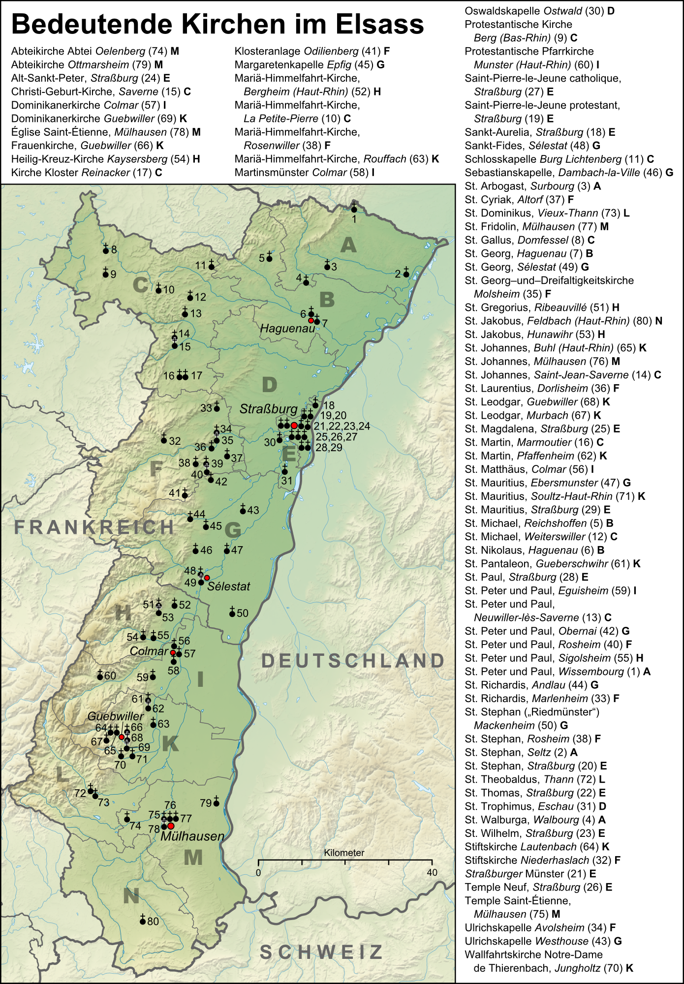 Verteilungskarte bedeutener Kirchen im Elsass.